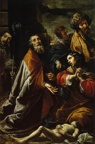 San Martín resucita a un niño